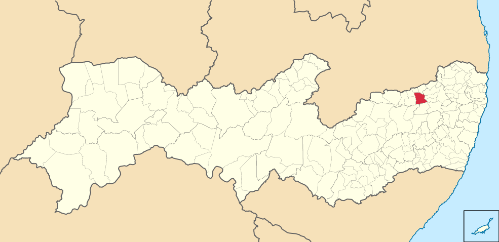 Mapa de Surubim (2)